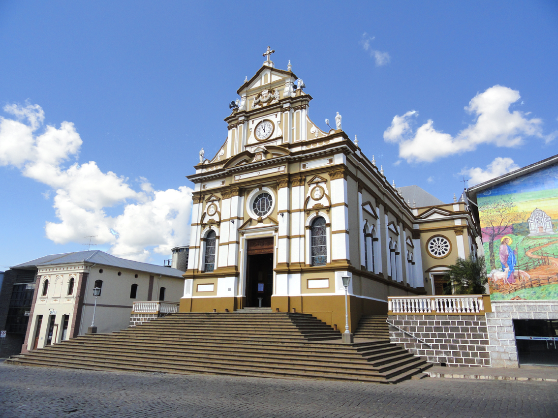 Igreja Matriz de Antônio Prado